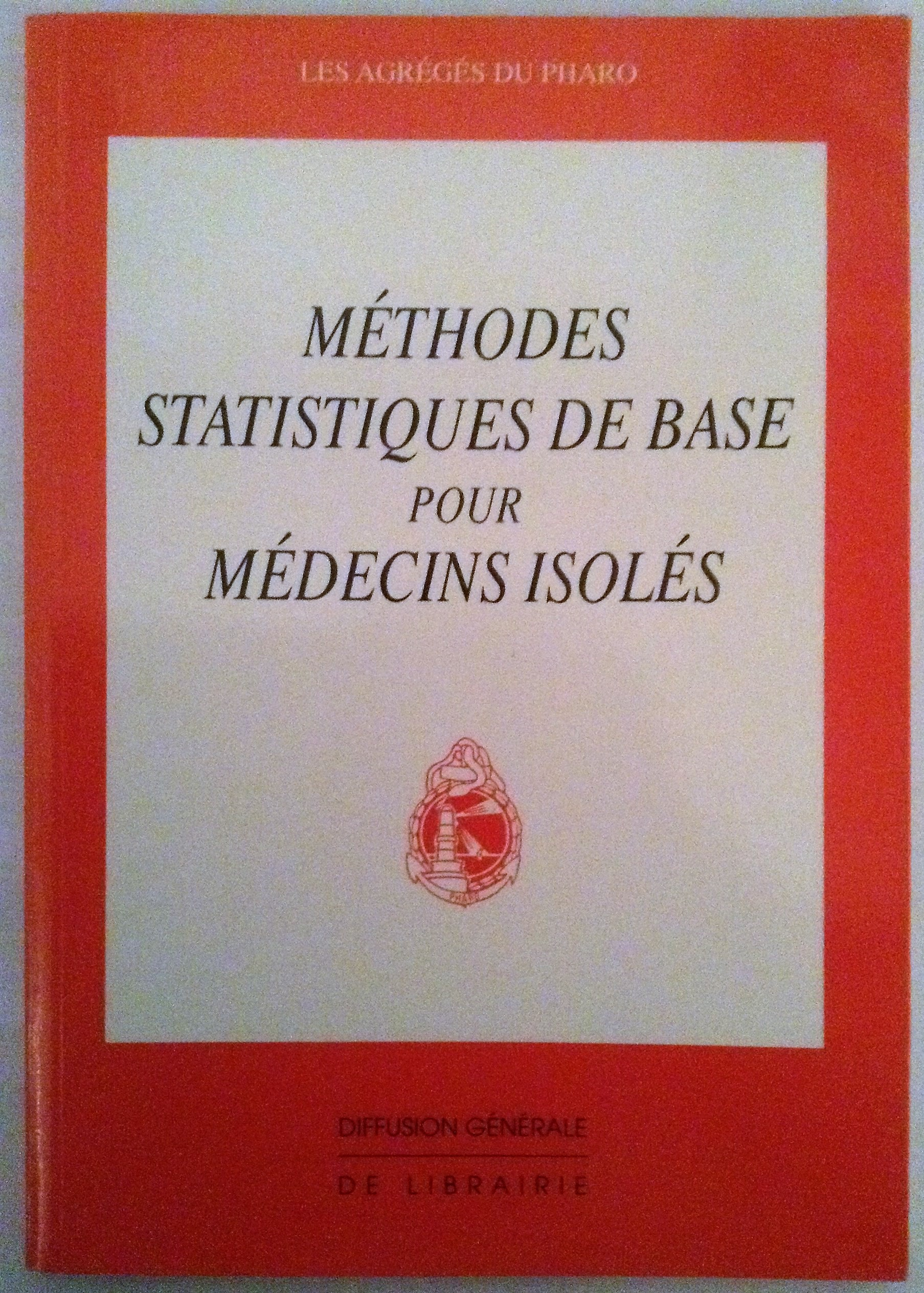 Couverture de l'ouvrage "Méthodes statistiques de base pour médecins isolés" dans la collection "les agrégés du Pharo"